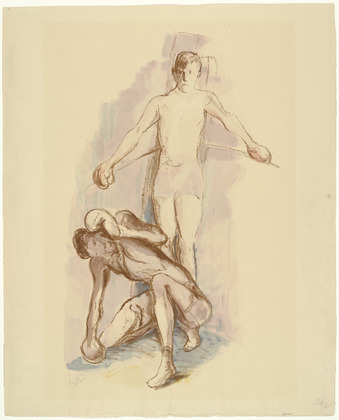 Lithografie von Rudolf Großmann mit dem Titel Der Boxer Hans Breitensträter", herausgegeben von Alfred Flechtheim", Format ca. 43.7cm x 25,8 cm, ein Geschenk von Abby Aldrich Rockefeller an das Museum of Modern Art ...